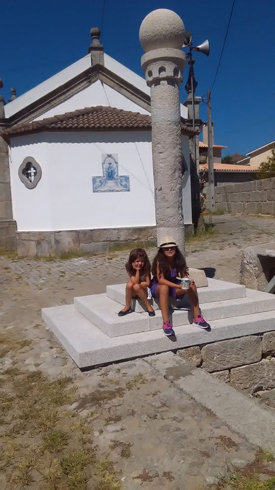 Duas lindas meninas, sentadas na base do nosso Pelourinho, que depois de um tenaz esforço, foi aqui recolocado, no ano de 2017